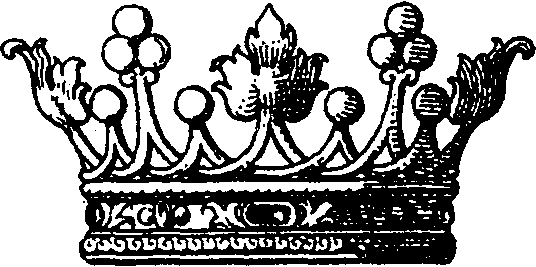 "Fig. 35. Caballerokrone in Spanien und Portugal. Der Stirnreif ist mit drei Blättern und zwei, mit je drei Perlen besetzten Zinken geschmückt, zwischen denen vier kleinere Perlzinken eingeschaltet sind."